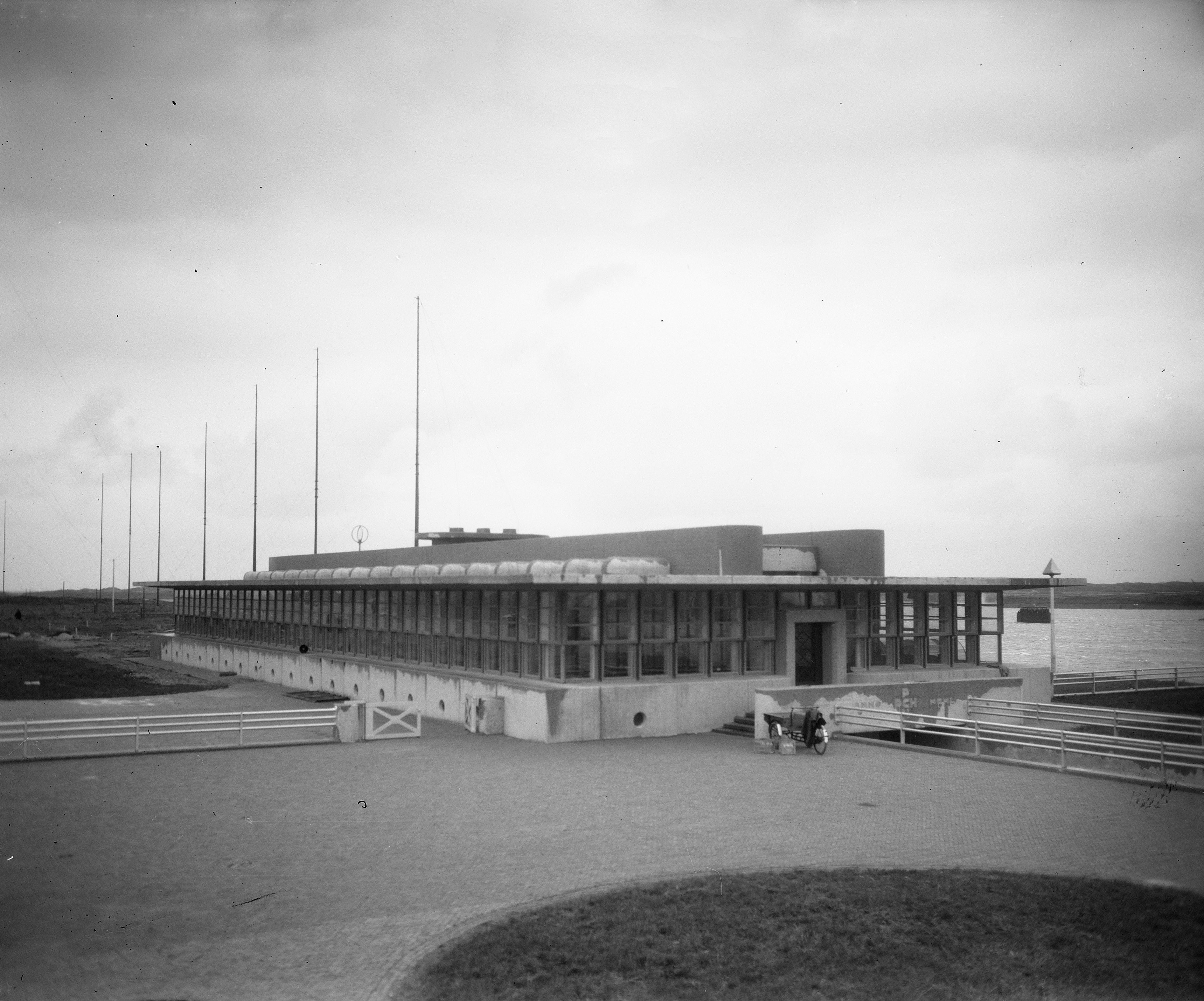 Collectie / Archief : Fotocollectie Anefo Reportage / Serie : [ onbekend ] Beschrijving : Nieuw station van Scheveningen Radio te IJmuiden Datum : 21 november 1951 Locatie : IJmuiden Trefwoorden : gebouwen, radiozenders Instellingsnaam : Scheveningen Radio Fotograaf : Duinen, […] van / Anefo Auteursrechthebbende : Nationaal Archief Materiaalsoort : Glasnegatief Nummer archiefinventaris : bekijk toegang 2.24.01.09 Bestanddeelnummer : 904-8573